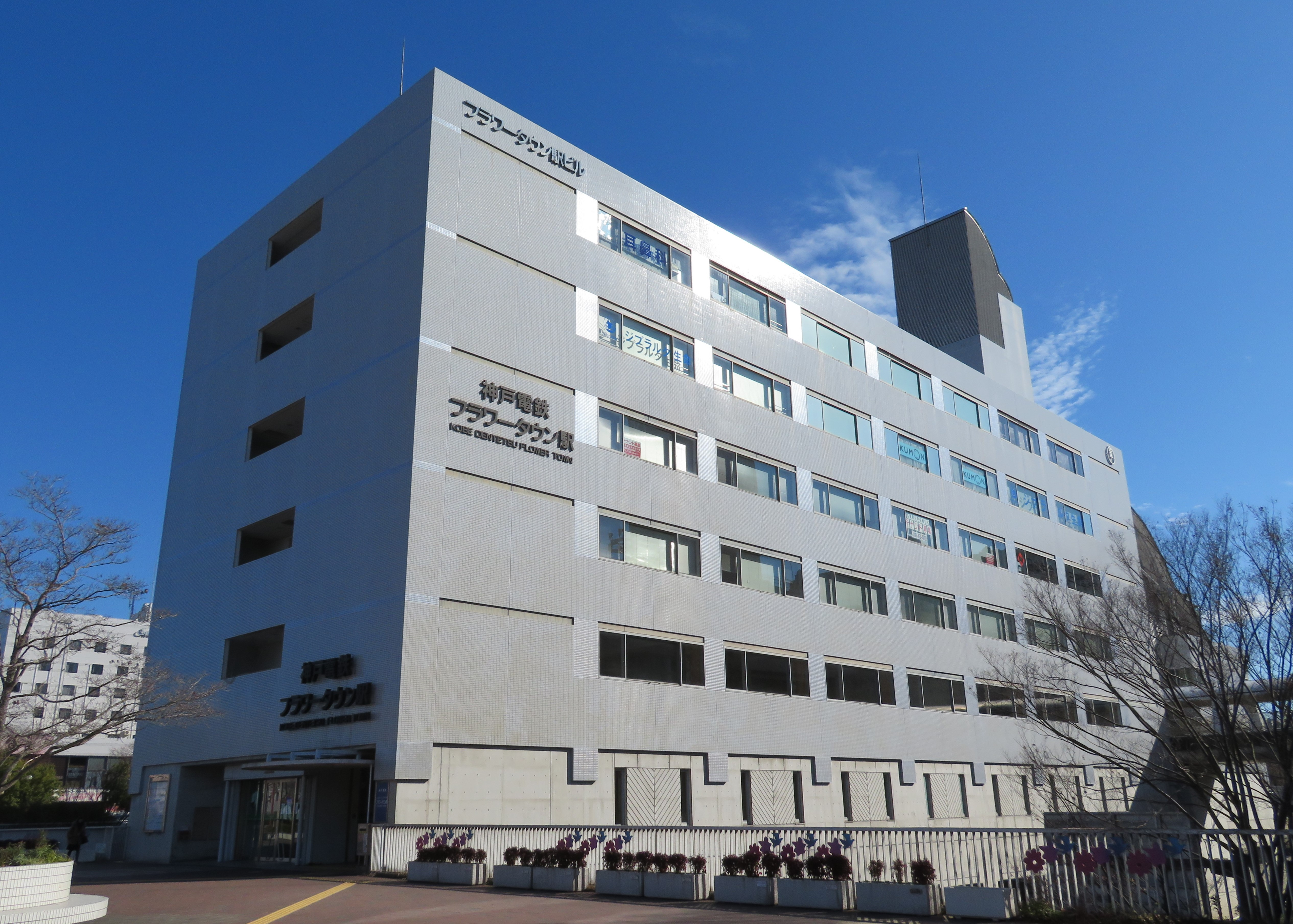 フラワータウン駅ビル